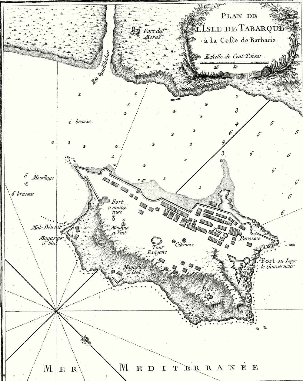 Plan de l'ile de Tabarka vers 1770 Collection personnelle Bertrand Bouret